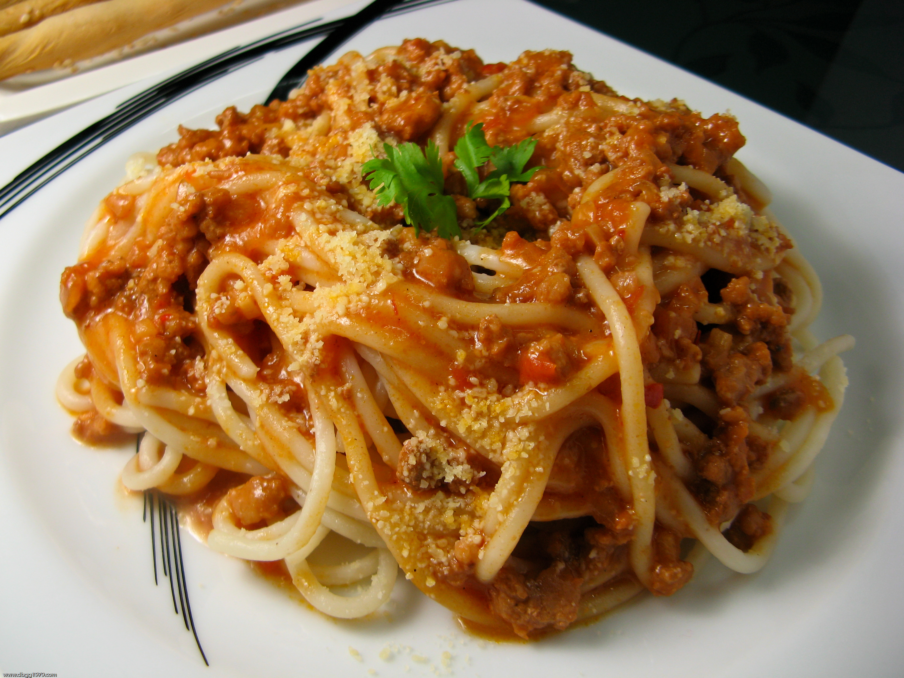 Template:Spaghetti Bolognese.